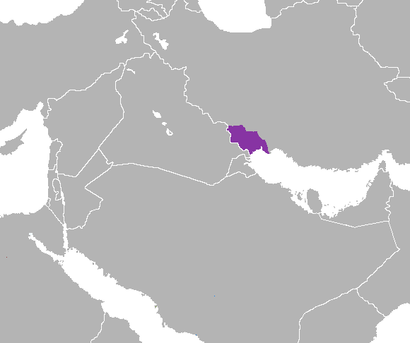 Árabe juzestaní